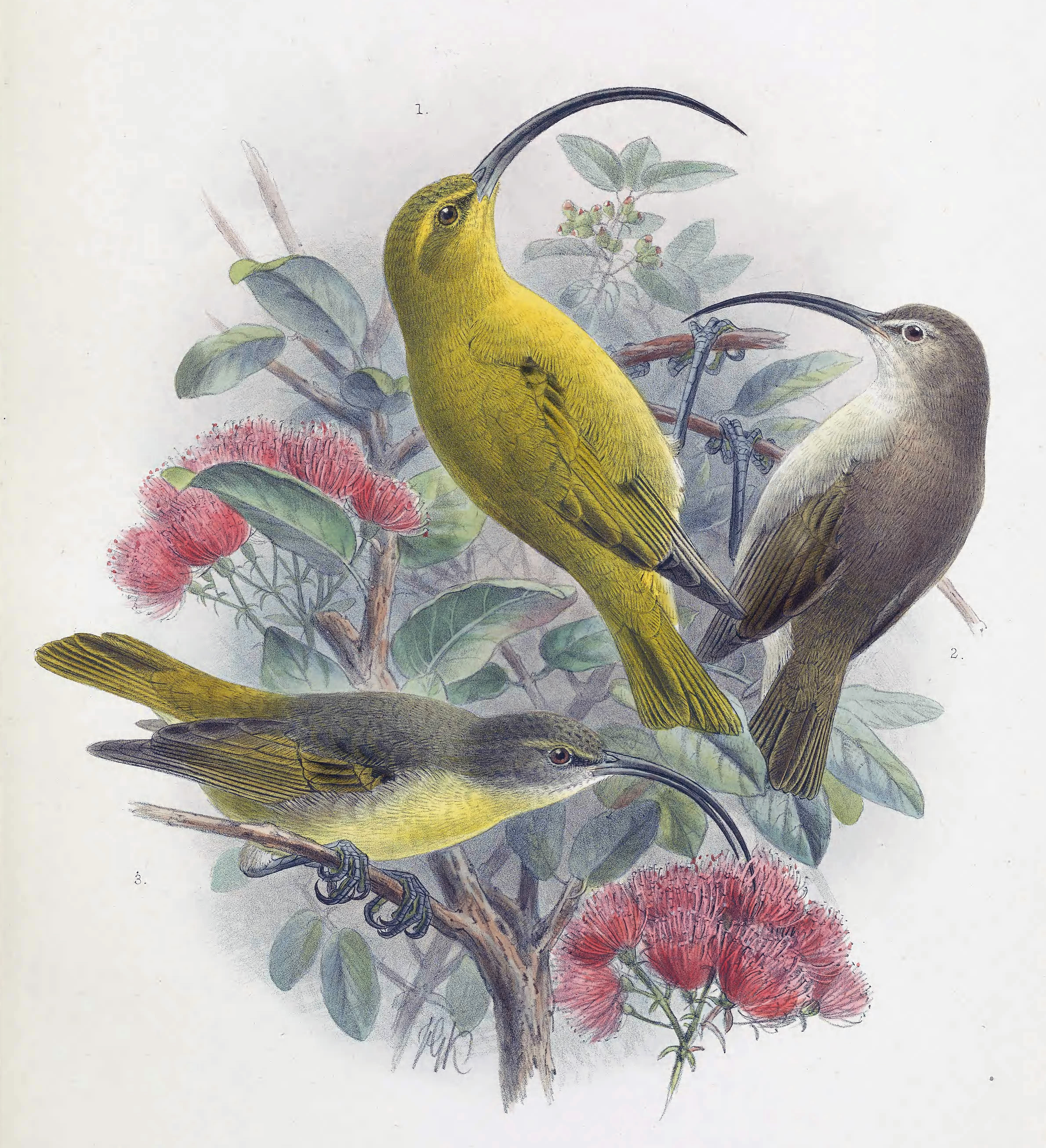 Hemignathus ellisianus (Original description: Hemignathus procerus, Cab. 1. male adult, 2. juv., 3. female.)